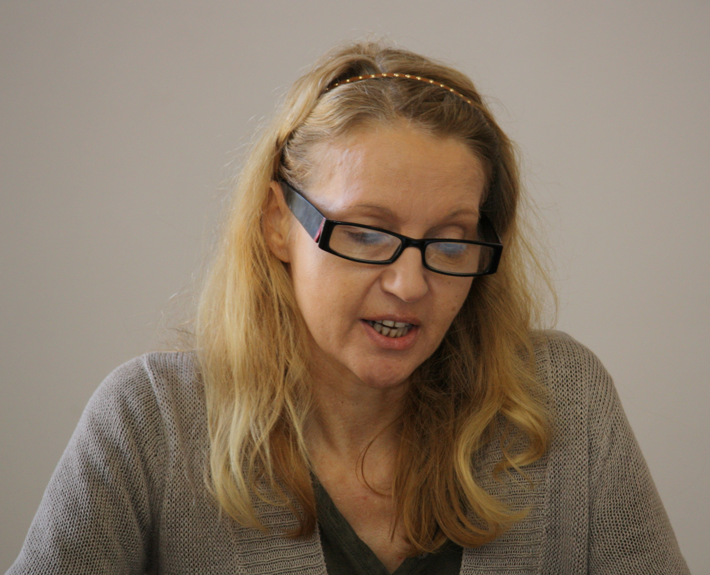 Irena Obermannová na veletrhu v Havlíčkově Brodě v roce 2010